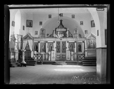 Беларуская (тарашкевіца): Касута (Kasuta). Петрапаўлаўская царква-мураўёўка